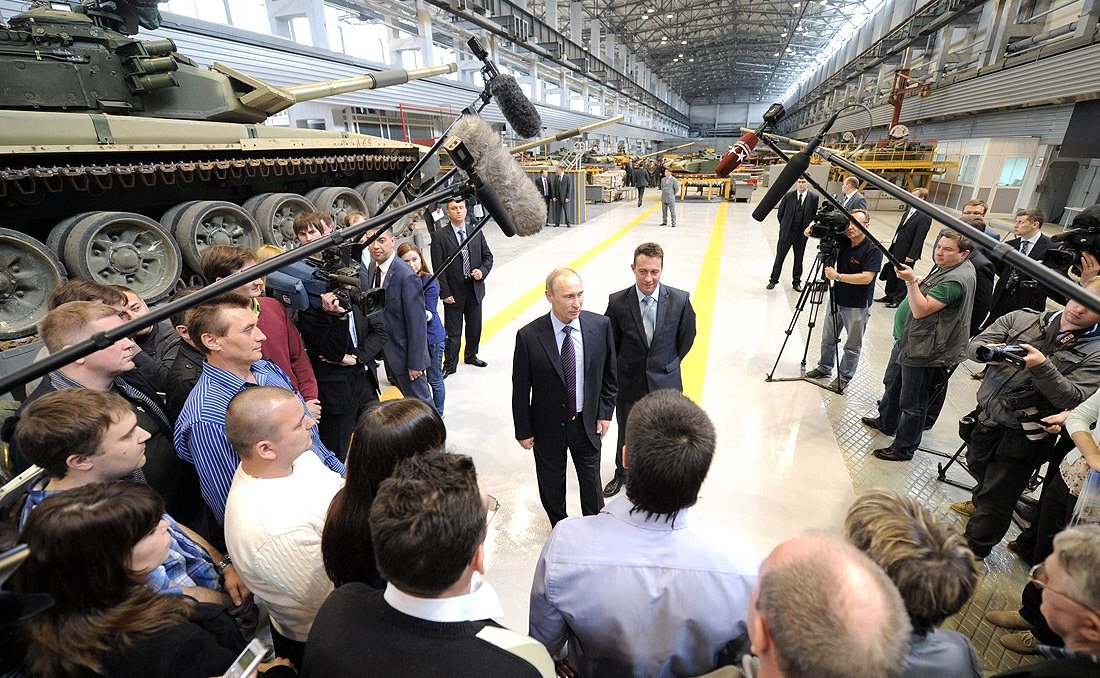 Посещение Владимиром Путиным НПК «Уралвагонзавод»